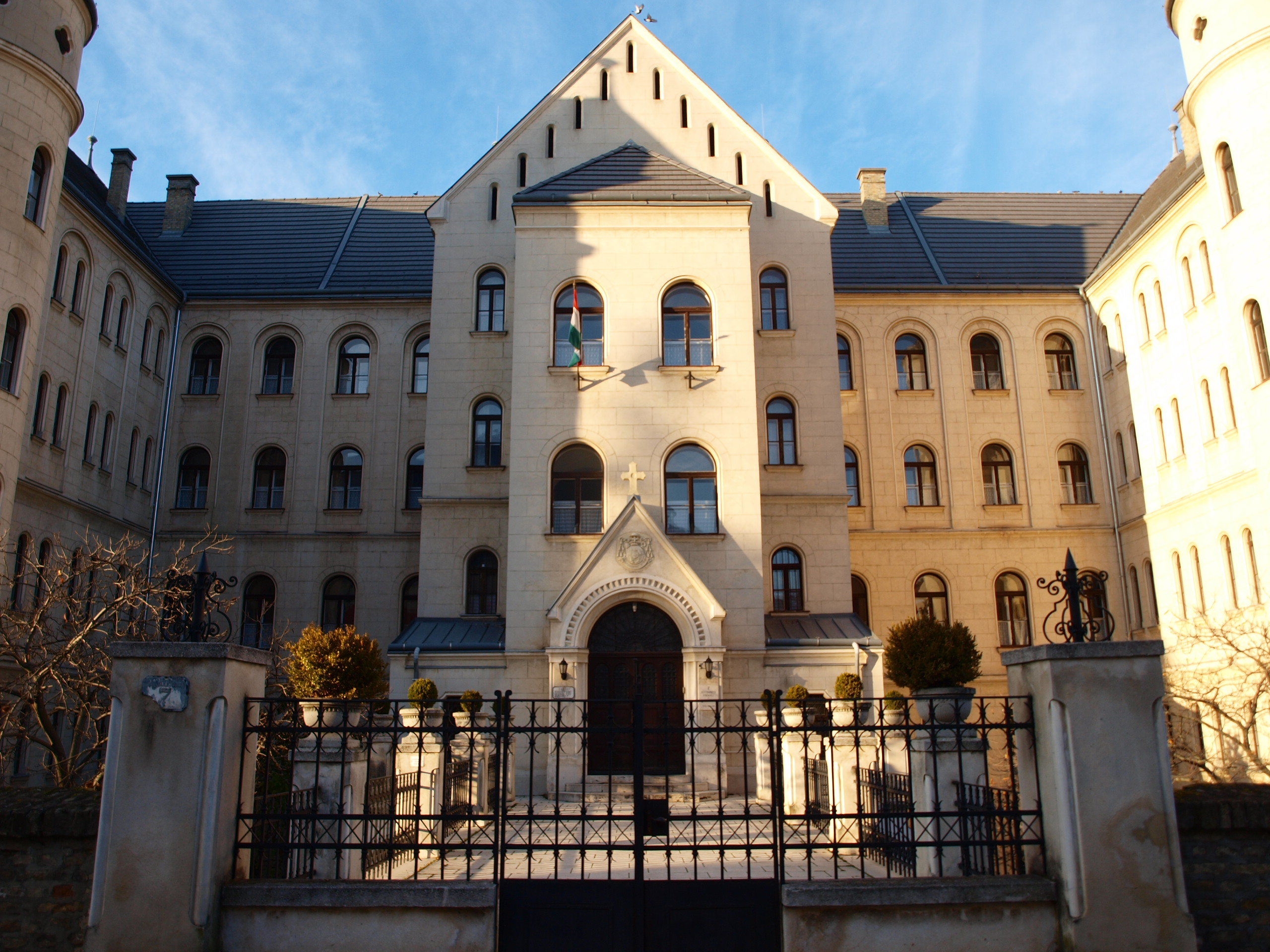 Győr biskupství vstup